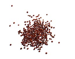 Photo de graines de moutarde statut